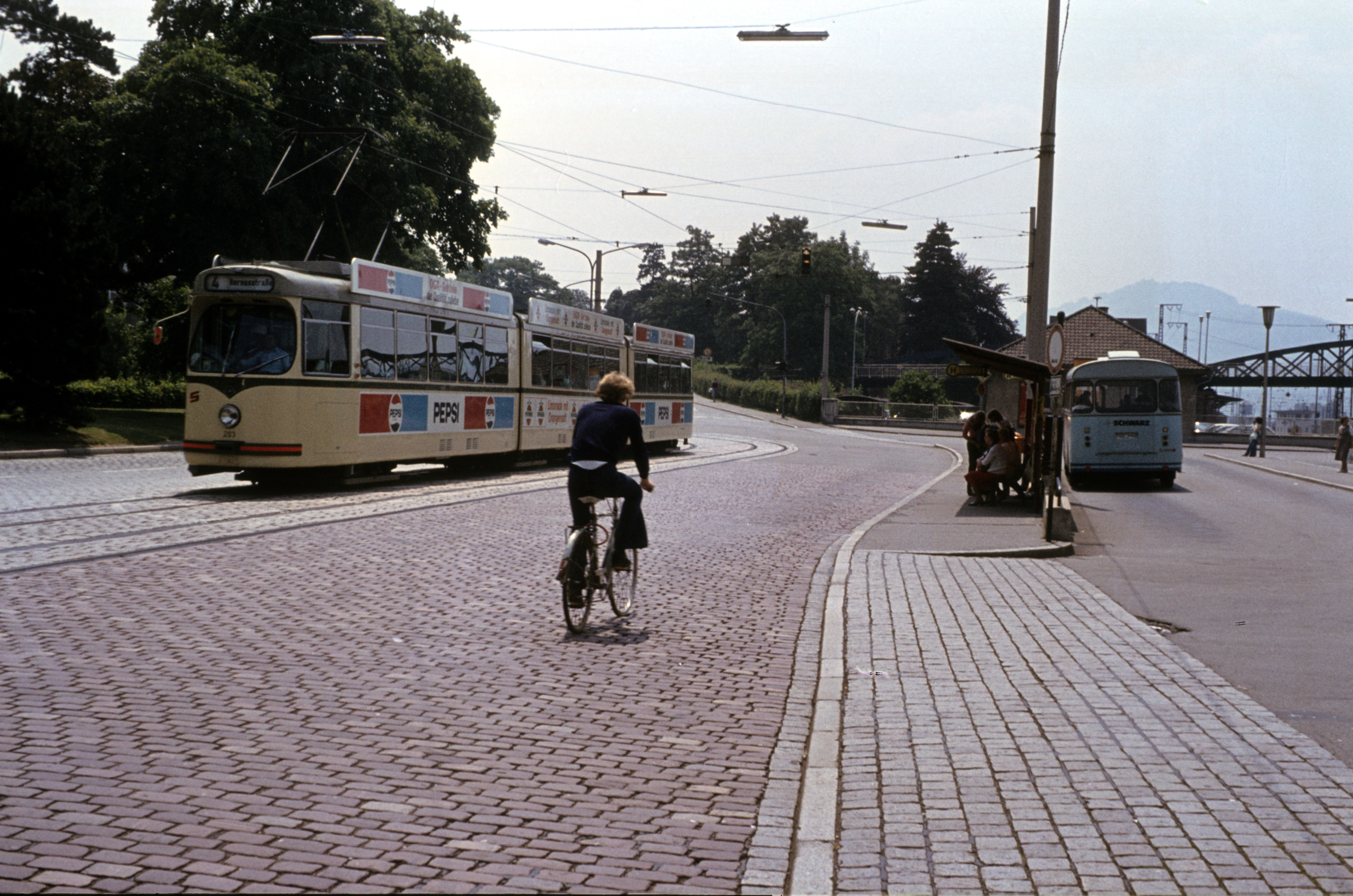 Bahnhofsvorplatz Freiburg als noch einer der ersten GT 8 über die Bismarckallee in Richtung Hauptfriedhof fuhren. Rechts der alte Busbahnhof